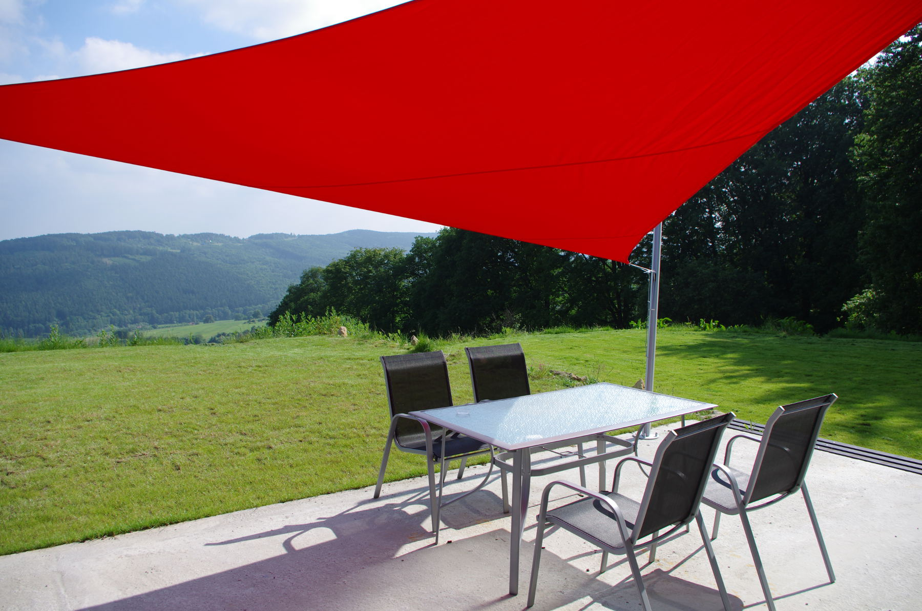 Trojúhelníková stínící plachta